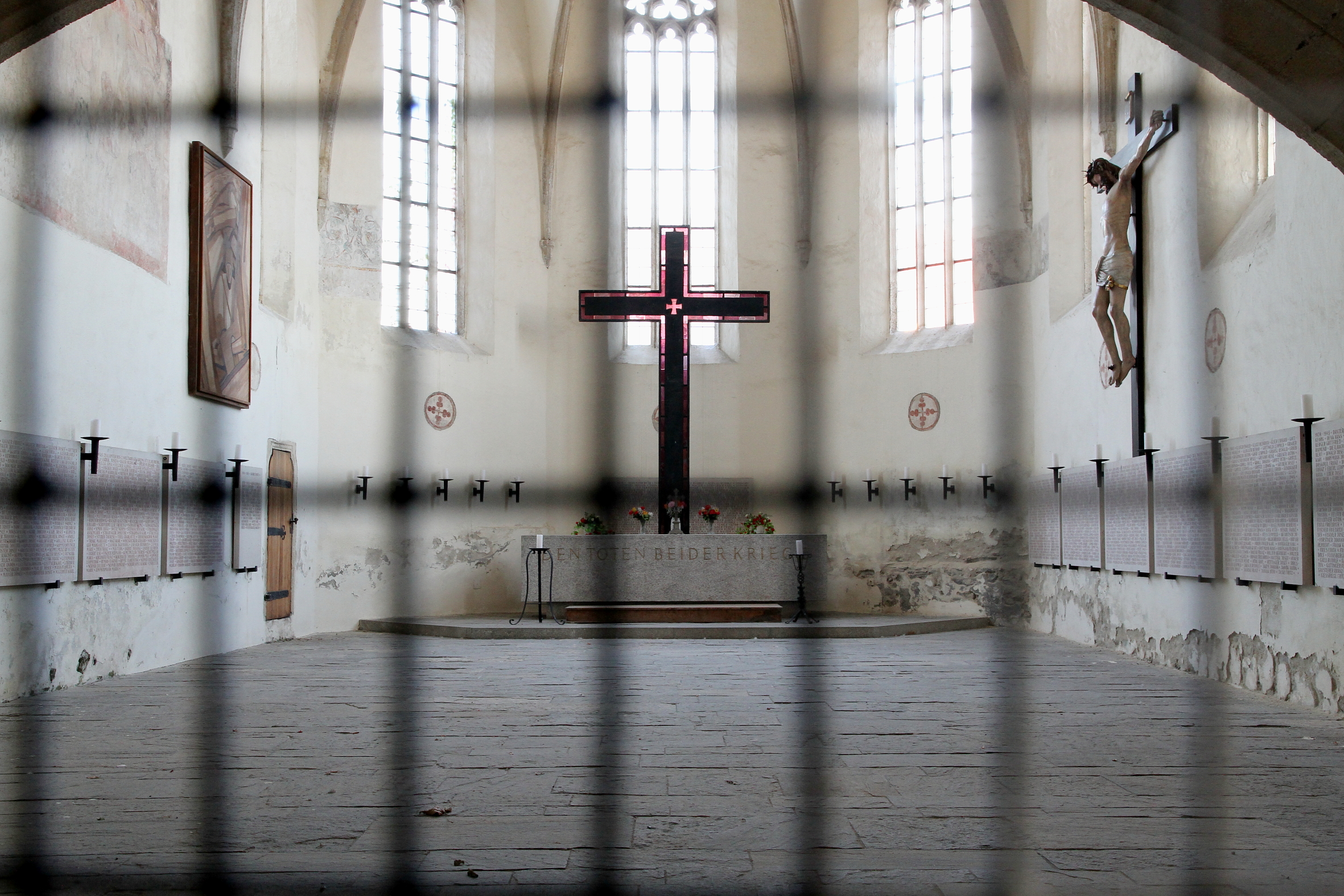 Die ehemalige Frauenbergkirche und jetzige Gedenkstätte der Gefallenen beider Weltkriege in Stein an der Donau.